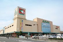 アルプラザ野洲店